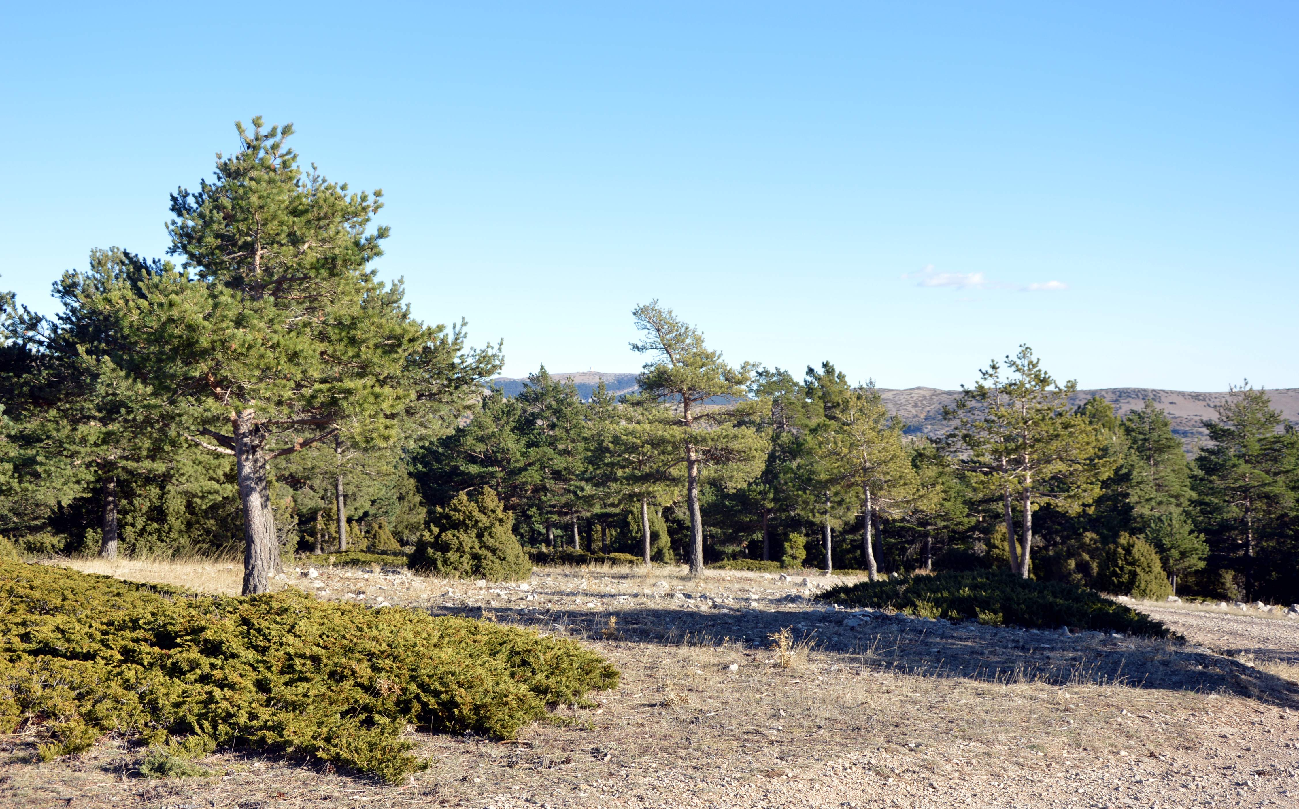 Paisaje en el Pico Gavilán, Puebla de San Miguel (Valencia), 2017.